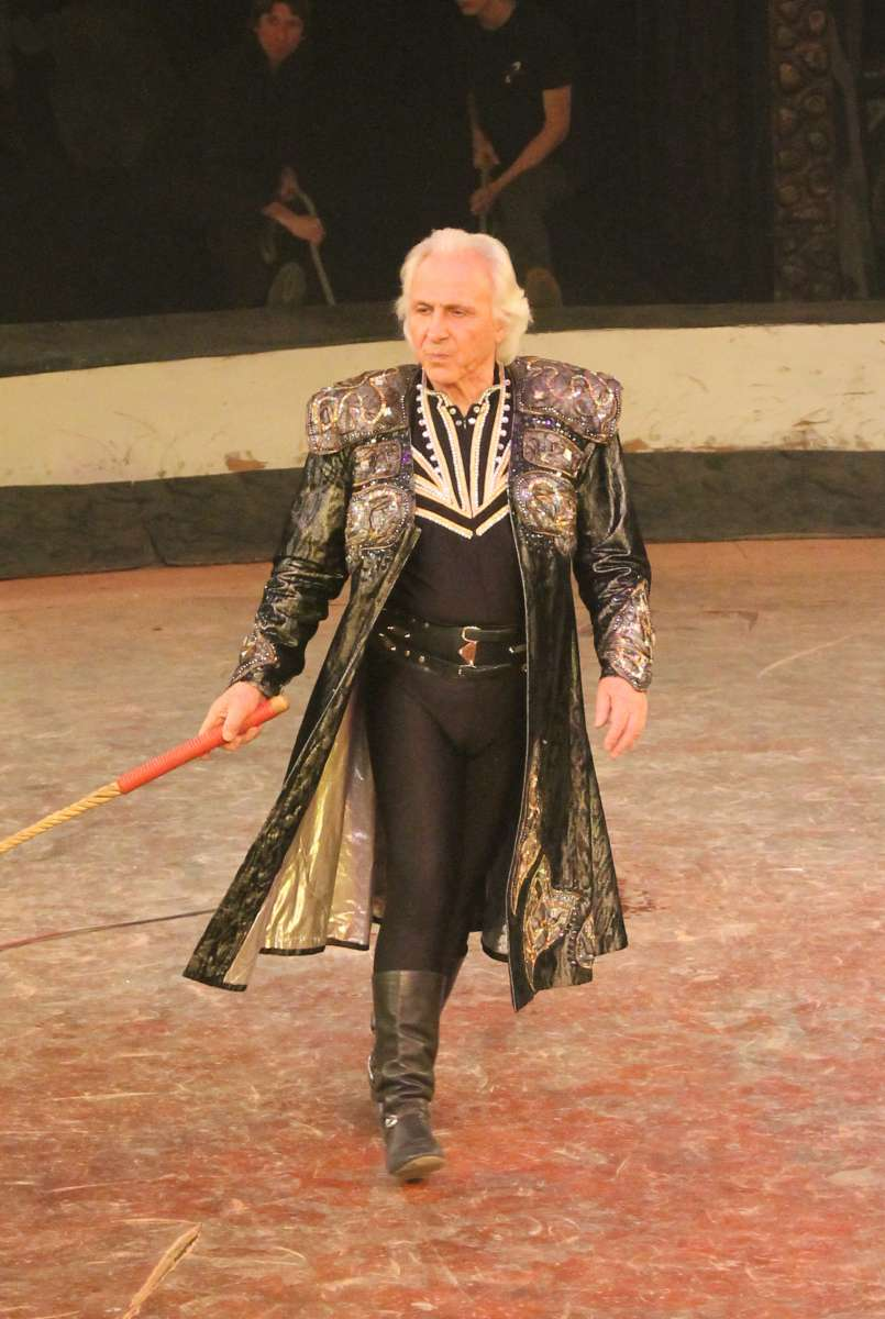 Лучший джигит отечественного цирка Нугзаров Тамерлан Темирсолтанович.